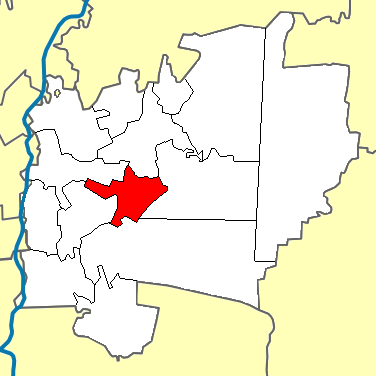 Сайрановська сільська рада